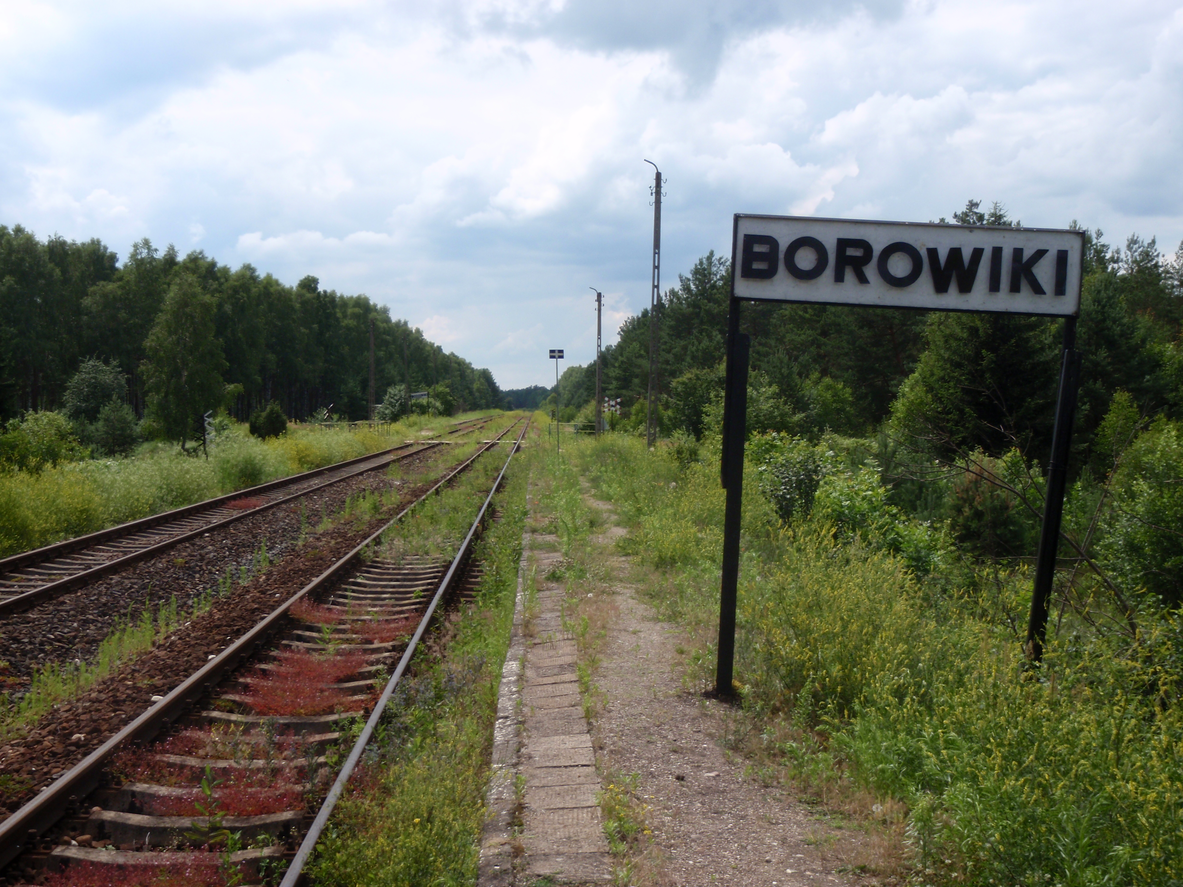 p.o. Borowiki - peron w stronę Siematycz